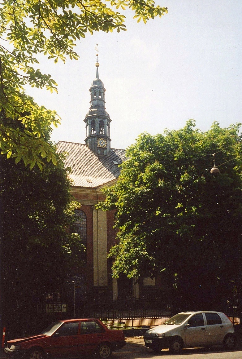 Den Tysk Reformerte Kirke, Københavnd Kommune